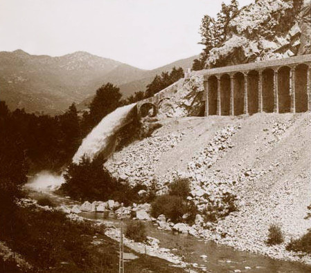 Canal del Pont del Carbur abocant aigua al riu. Rafael Degollada i Castanys (Entre 1912 i 1924)